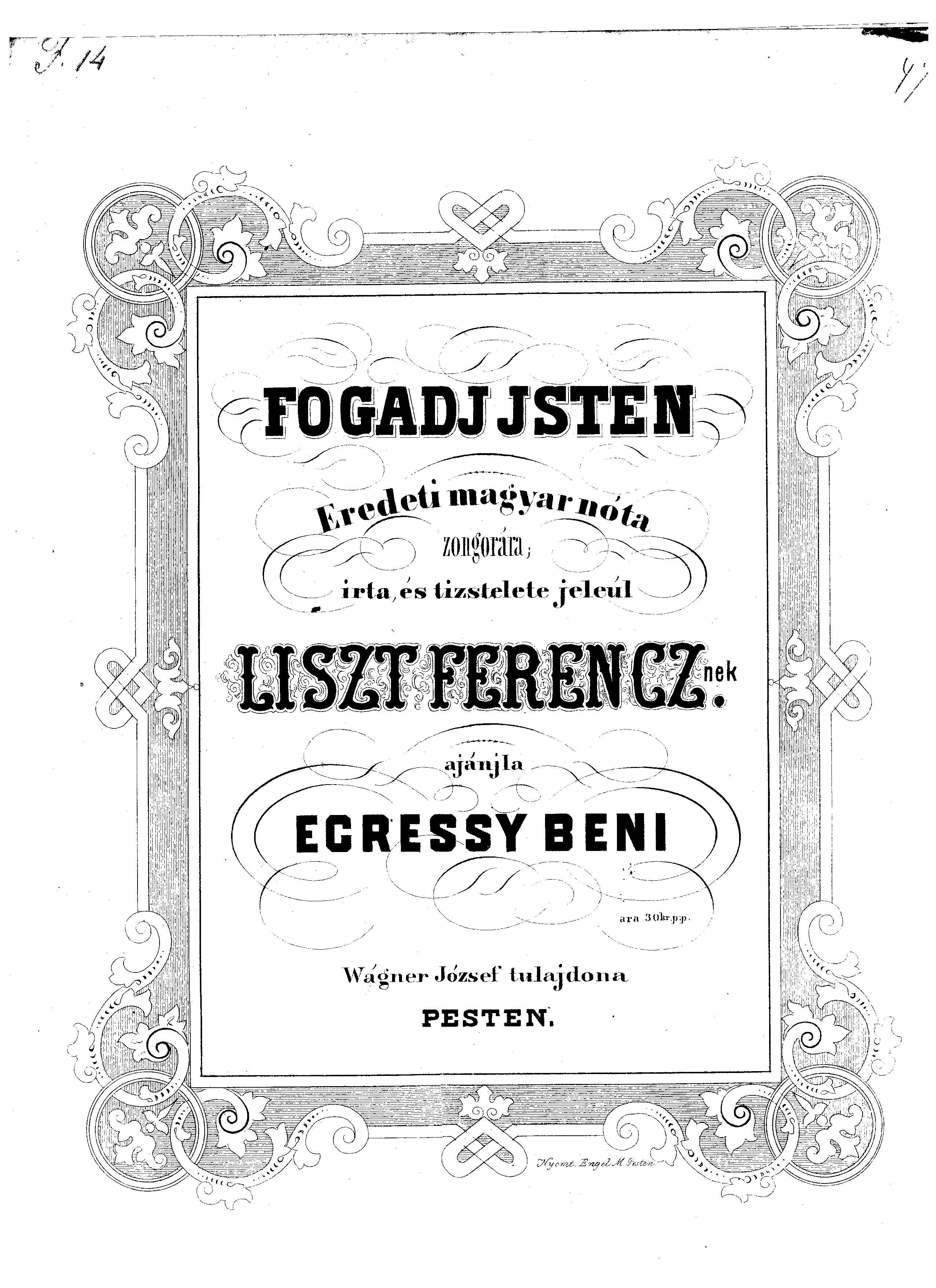 Egressy Béni kottája. ©© Derzsi Elekes Andor, Budapest 2014, You are authorised to use these photos and vids under Creative Commons – even for commercial, for profit purposes. Photos must be attributed to Derzsi Elekes Andor. All of the photos and vids in the Metapolisz DVD line are under Creative Commons and can be used even for commercial – for profit – purposes. Recommended Citation Derzsi Elekes Andor: Metapolisz DVD line